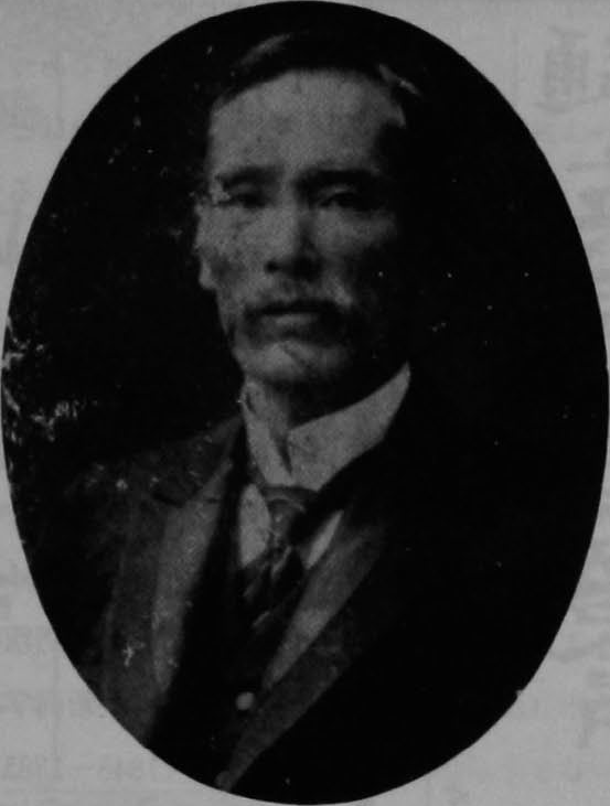 梅浦精一（1852-1912） （三条市塚野目 梅浦雄一氏蔵）